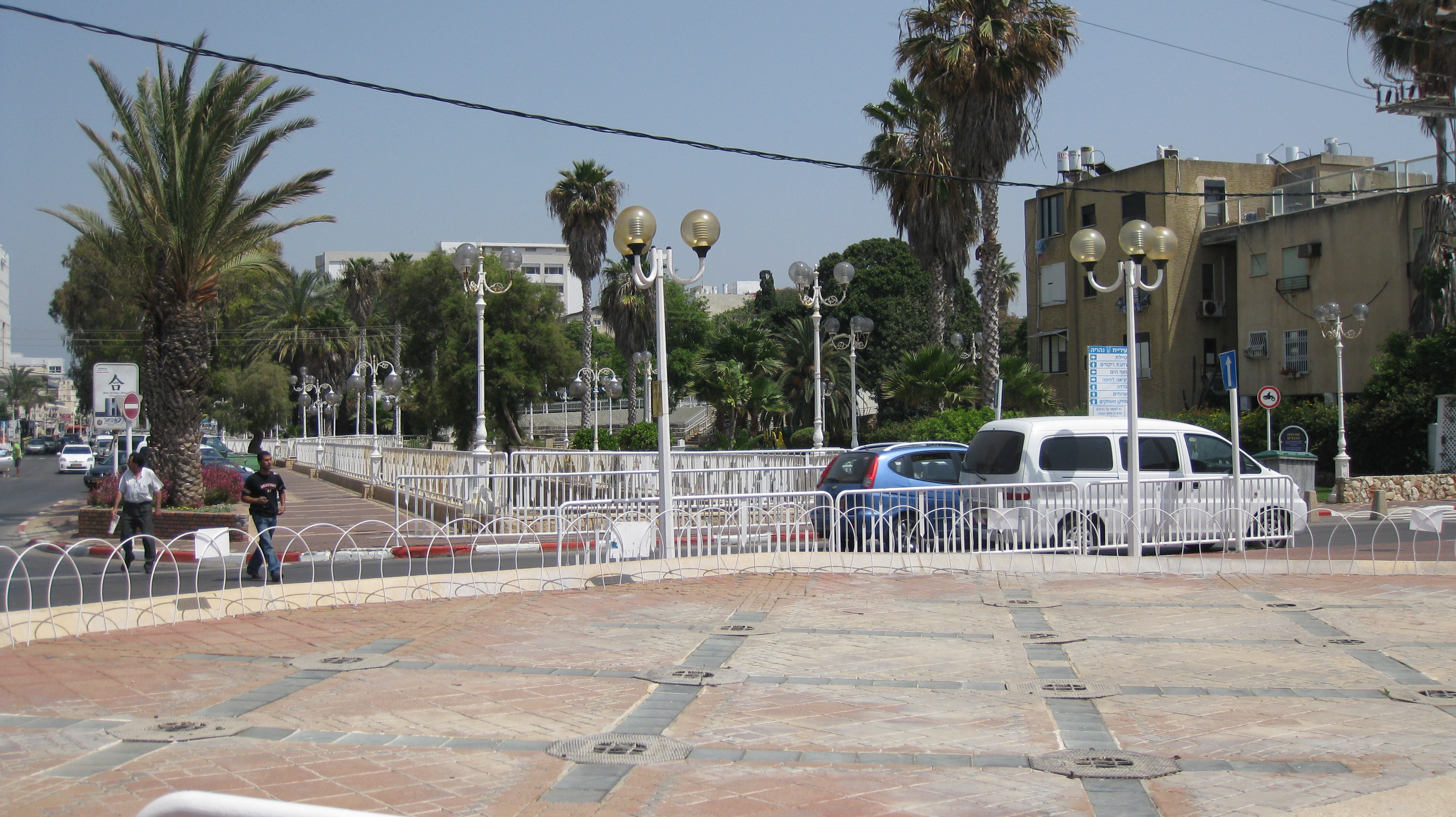 Nahariyya - Gaaton River, near the Nahariyya beach נהריה שפך נהר הגעתון אל הים